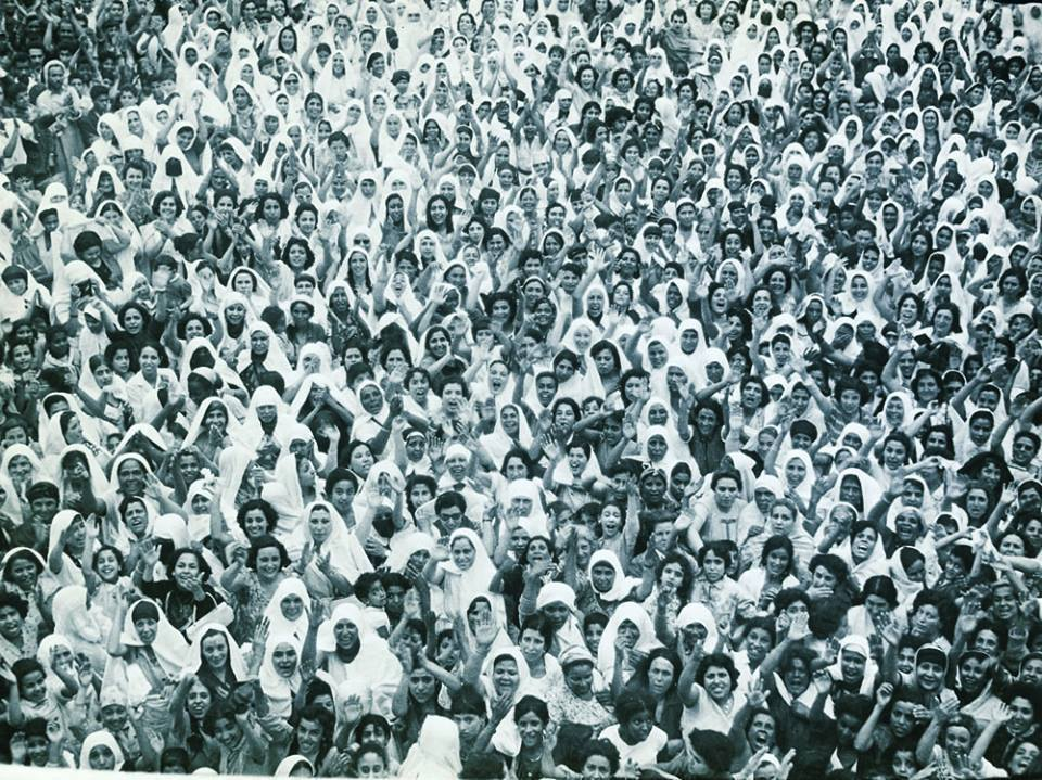 Femmes tunisiennes sortant spontanément, le 14 aout 1956, célébrer le Code du Statut Personnel tunisien le lendemain de sa promulgation